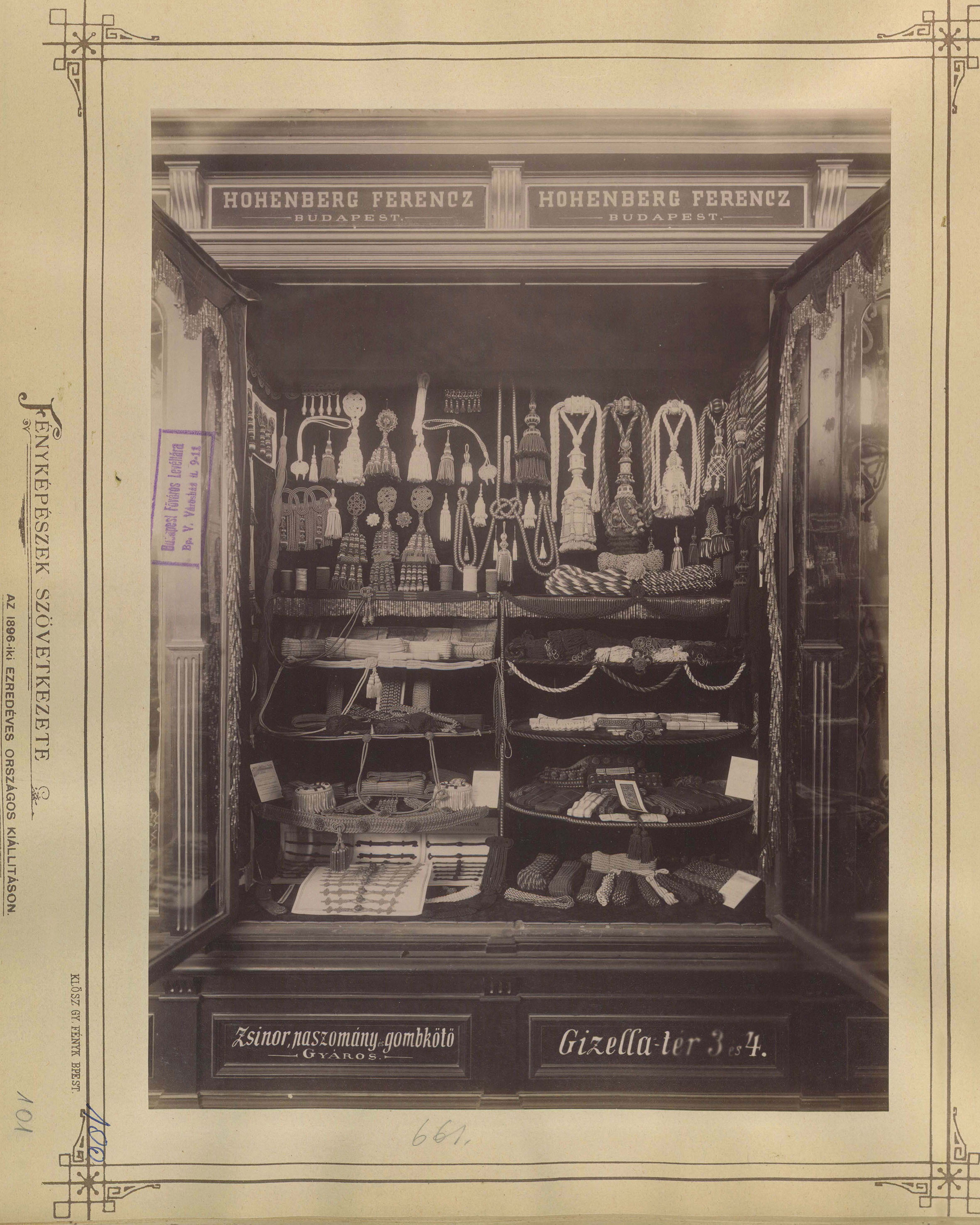 "Millenniumi kiállítás: Hohenberg Ferenc Zsinór, Paszomány és Gömbkötő gyáros. A felvétel 1896-ban készült." A kép forrását kérjük így adja meg: Fortepan / Budapest Főváros Levéltára. Levéltári jelzet: HU.BFL.XV.19.d.1.10.198 Location: Hungary, Budapest XIV. Tags: Budapest, Millennium Exhibition